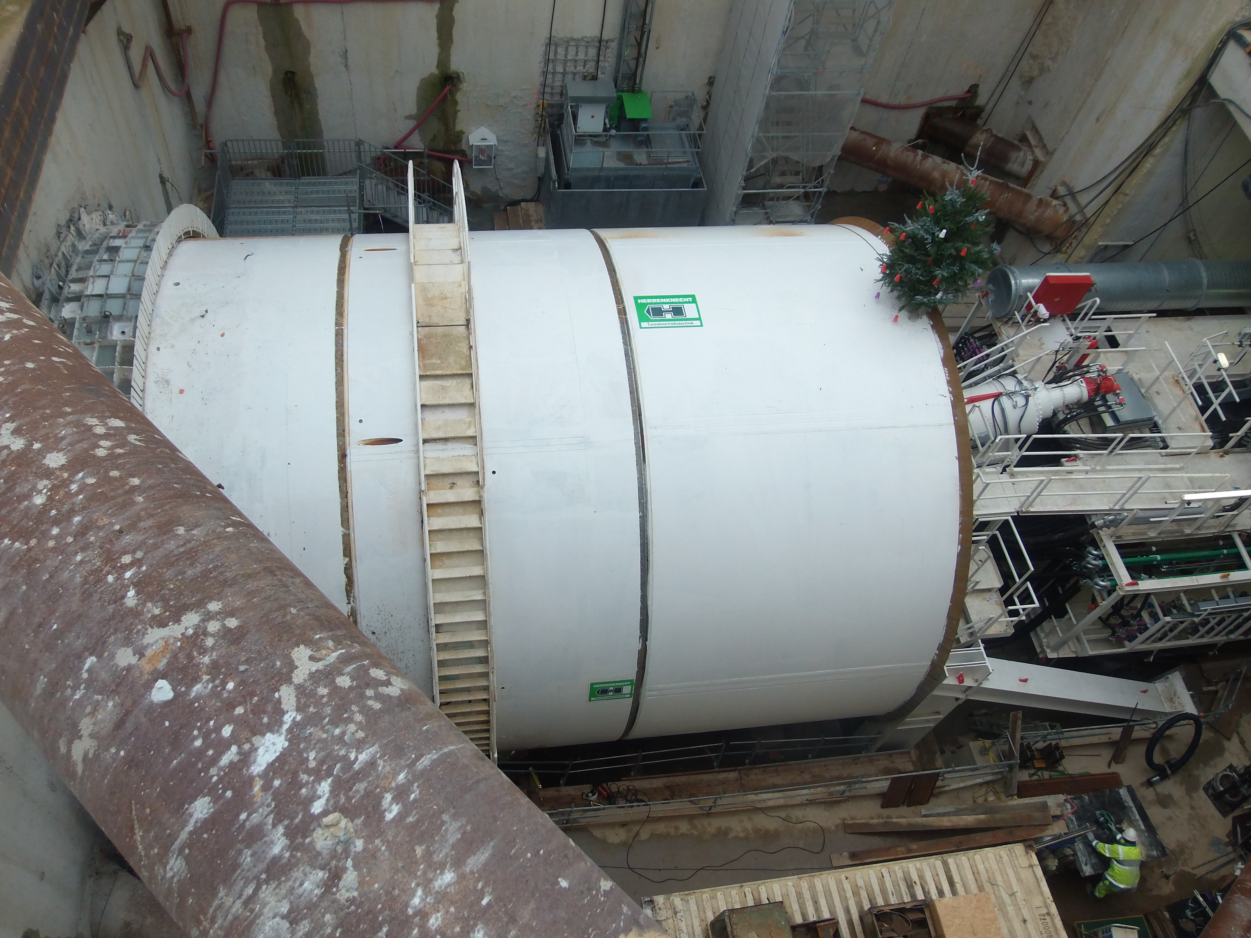 Visite du chantier du tunnelier de la ligne B du métro de Rennes le 22 décembre 2014. Vue de la tête du tunnelier.